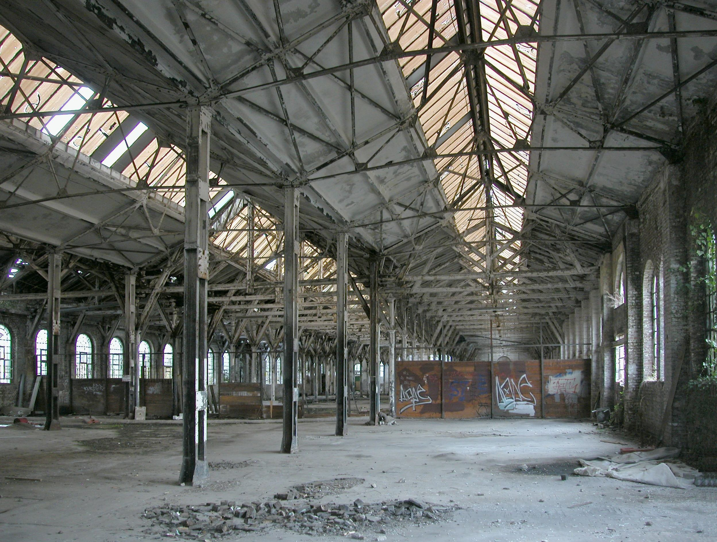 Mülheim an der Ruhr, verlassene Werkshalle, Blickrichtung S Standortkoordinaten: 51°25′42.84″N 6°51′53.83″E / 51.4285667°N 6.8649528°E